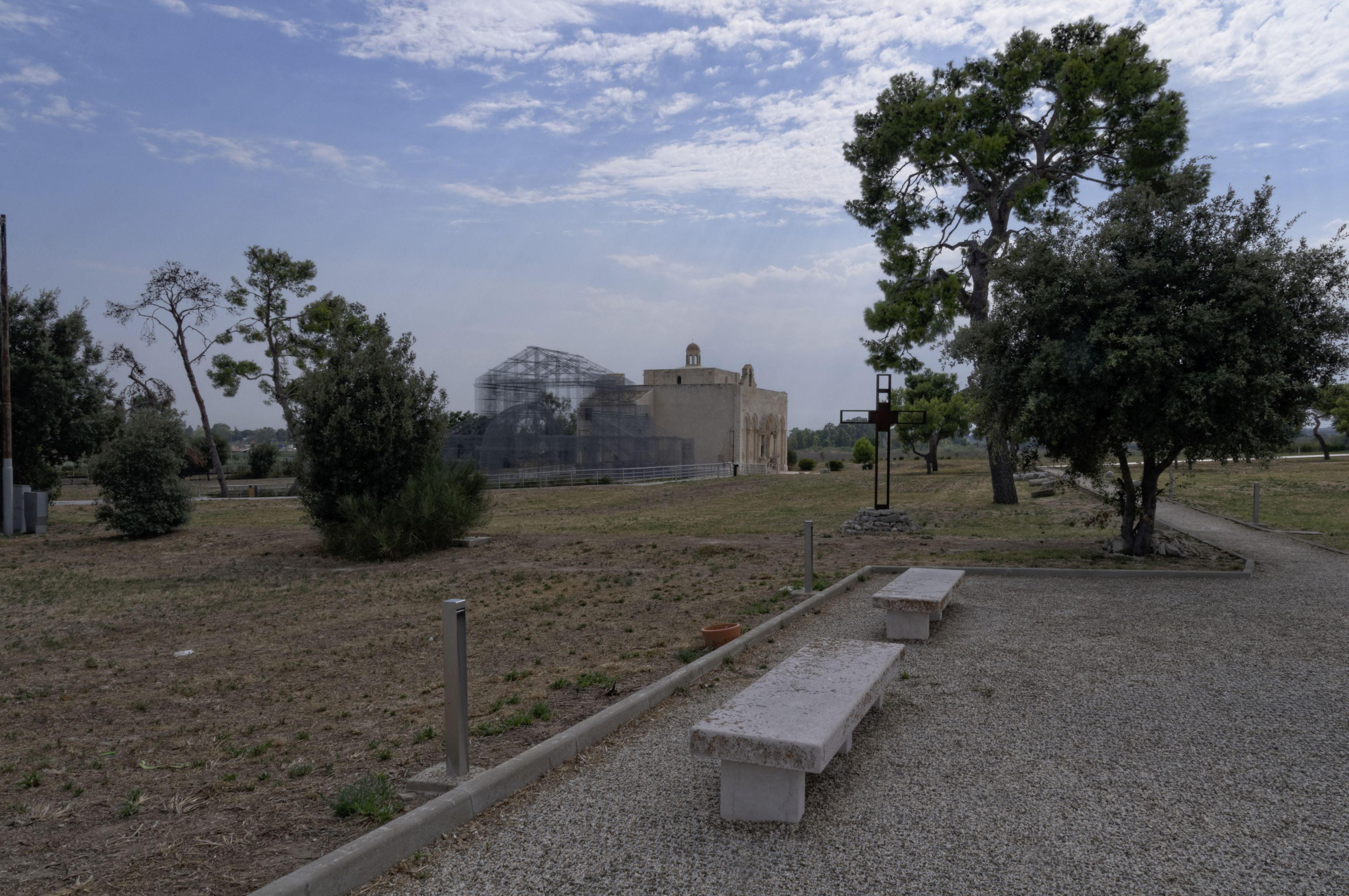 Manfredonia Santa Maria Maggiore (Siponto) 2017